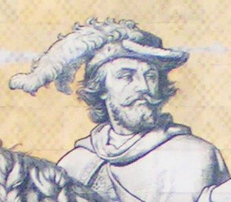 Friedrich der Gebissene, Dresdener Fürstenzug